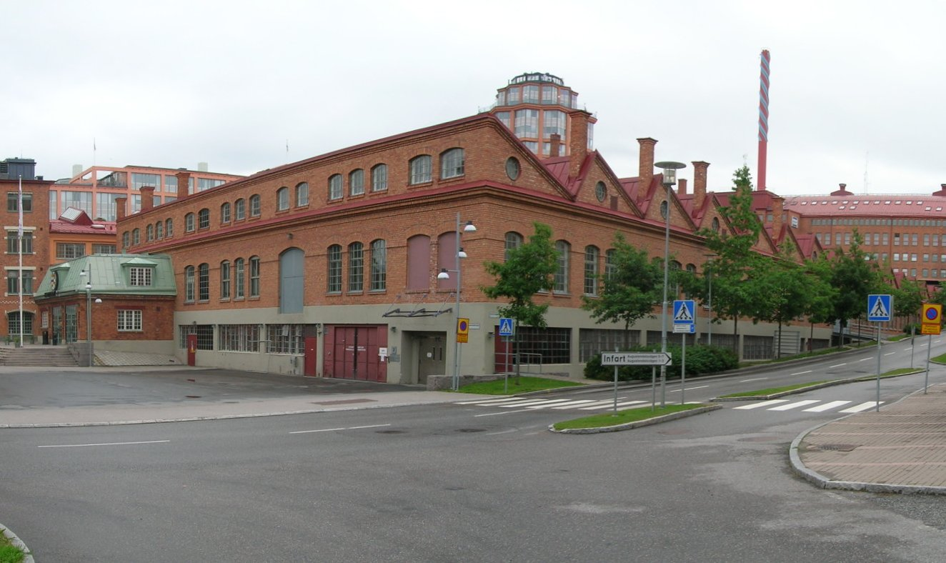 f.d. J.V. Svensons motorfabriks lokaler vid Augustendalsvägen, Nacka strand, Nacka, Sverige